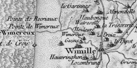 Carte générale de la France. 022, [Boulogne-sur-Mer. Nouv. éd.]. N°22 / [établie sous la direction de César-François Cassini de Thury]. Source Gallica.